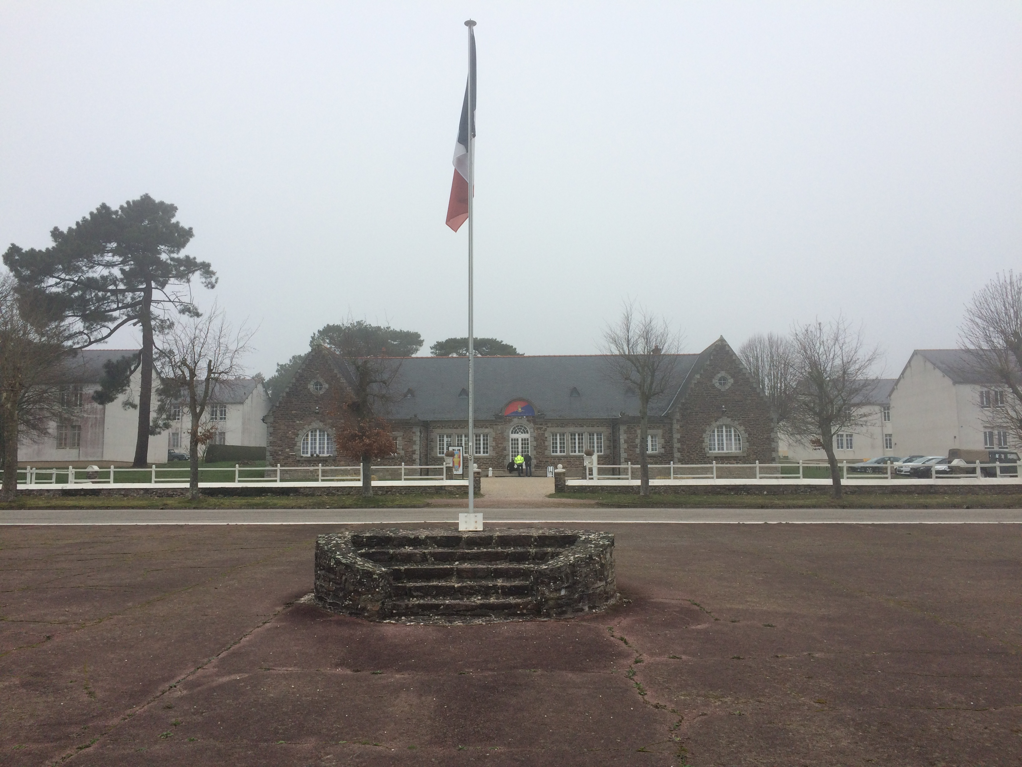 Quartier général du 4° Bataillon de Saint-Cyr à Coetquidan en 2019 vu du marchfeld Turenne